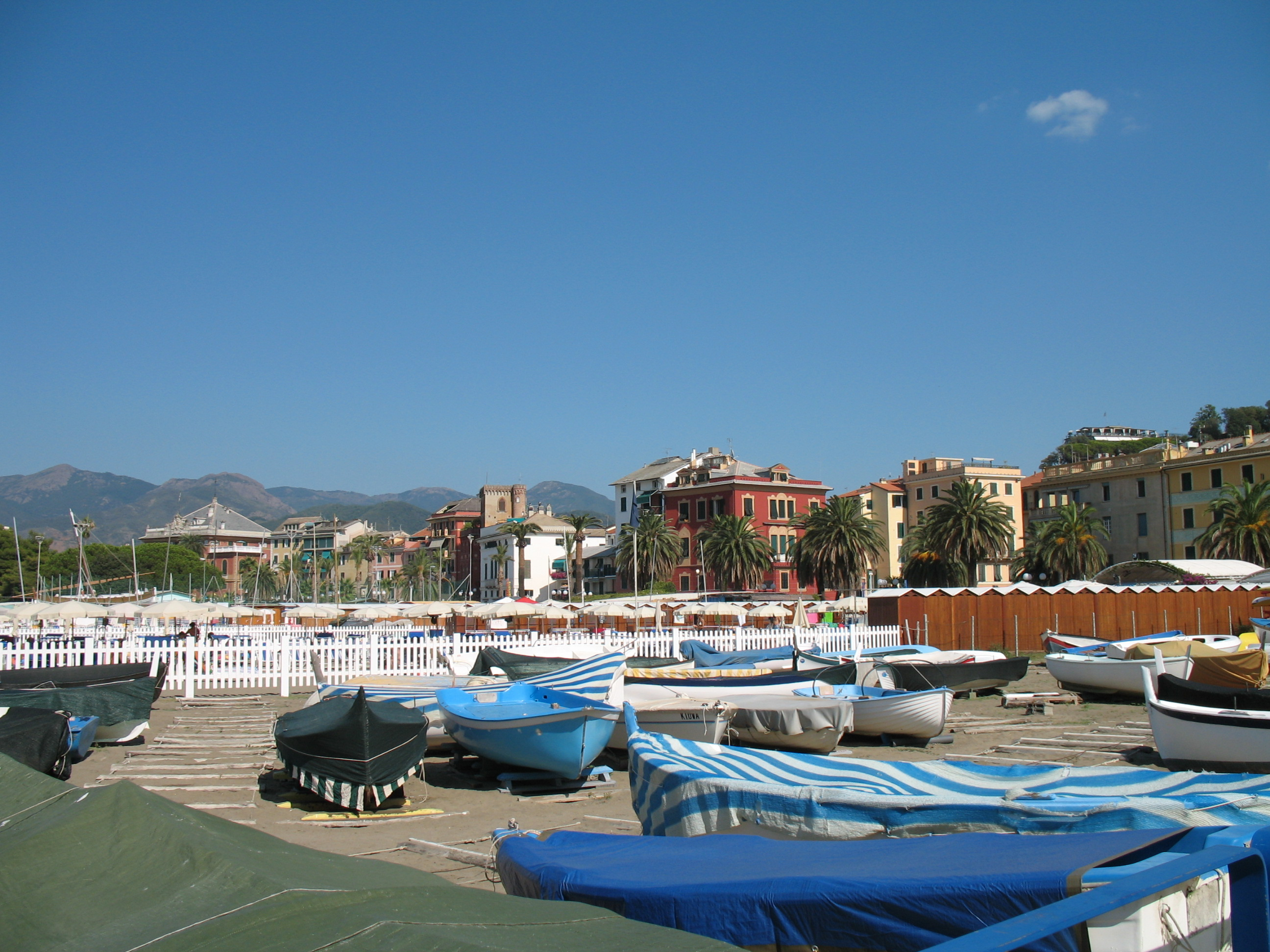 Immagine da Sestri Levante